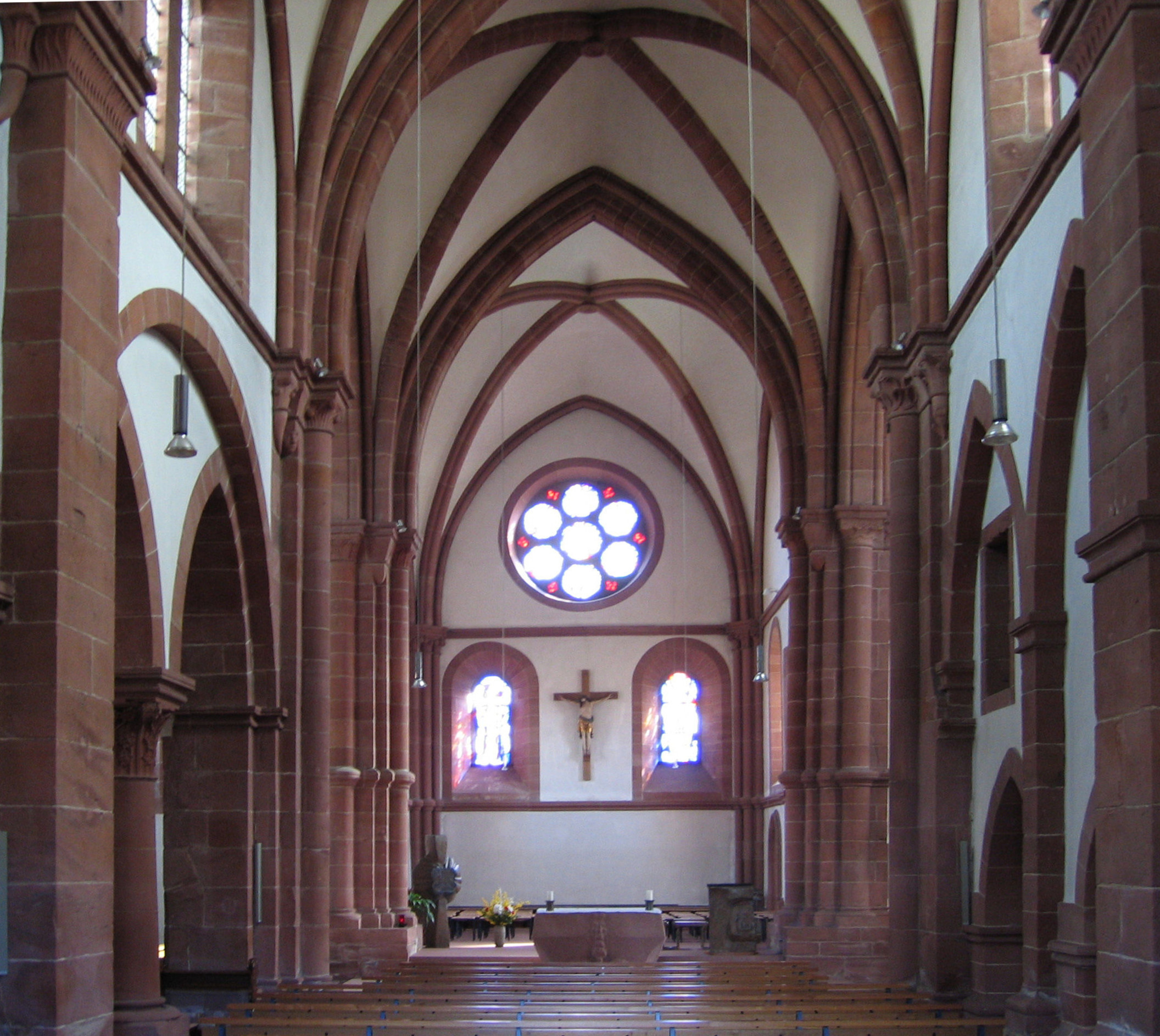 Description: church in Enkenbach in Landkreis Kaiserslautern, Germany --Immanuel Giel 10:04, 13 April 2007 (UTC)